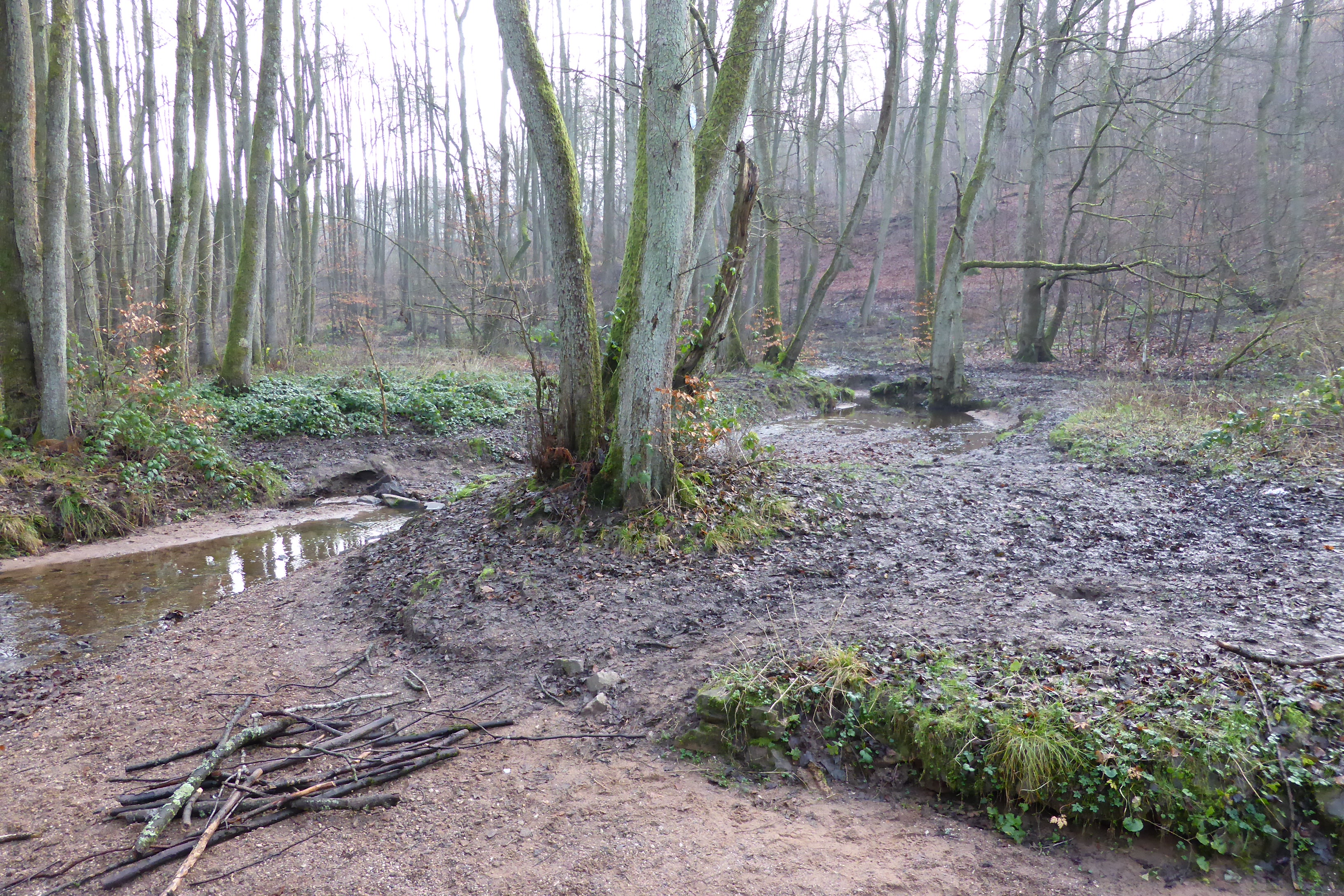 NSG Ruhbachtal im Saarland